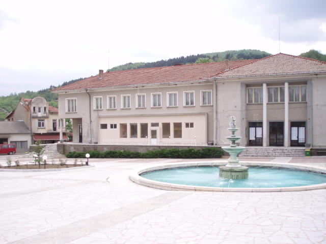 Площад в село Градница, област Габрово.